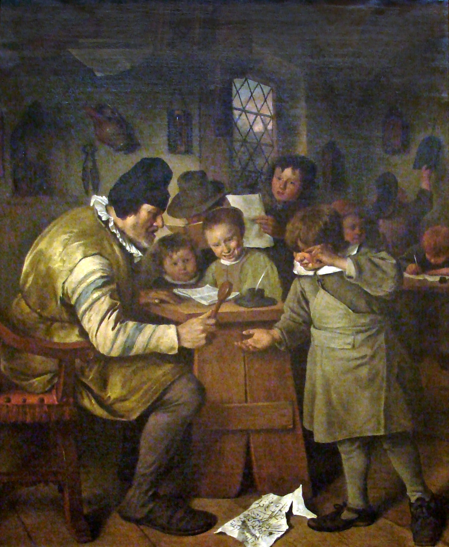 Die Dorfschule